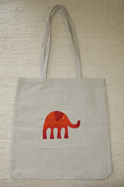 Látková taška s kapsou a potiskem vyrobená občanským sdružením Český západ.